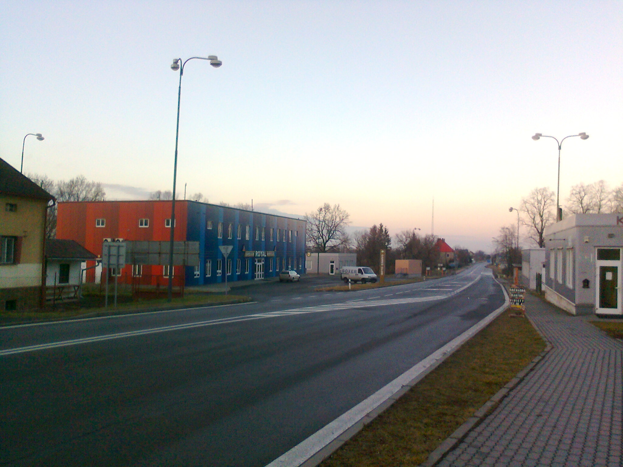 Przejście graniczne Trzebina–Bartultovice, widok od strony czeskiej